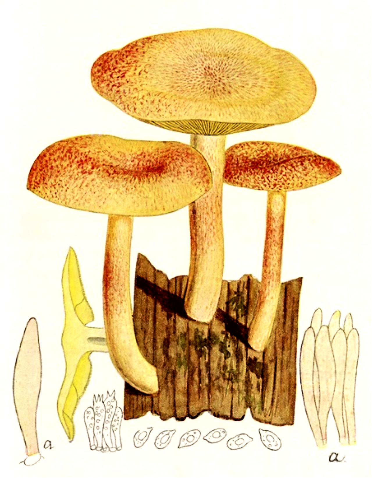 Giacomo Bresadola: Tricholoma rutilans (Schaeff., 1774) P.Kumm. (1871), heute Tricholomopsis rutilans (Schaeff.) Singer (1939)